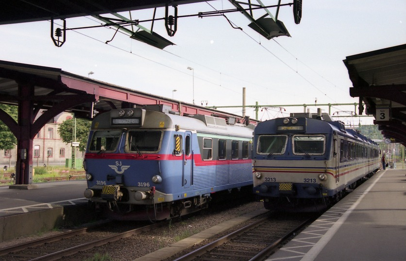 Borås station med plattformar och tåg